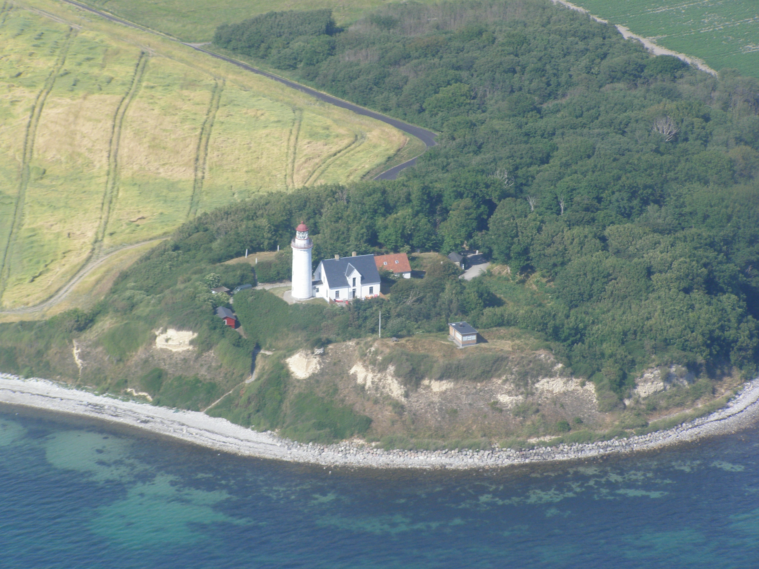 Den gamle forsvarsbanke på Samsøs syd-spids. Hvor fyrtårnet ligger i dag lå engang en af kong Valdemars borge, som man stadig kan se rester af. Økomuseum har en udstilling på stedet.